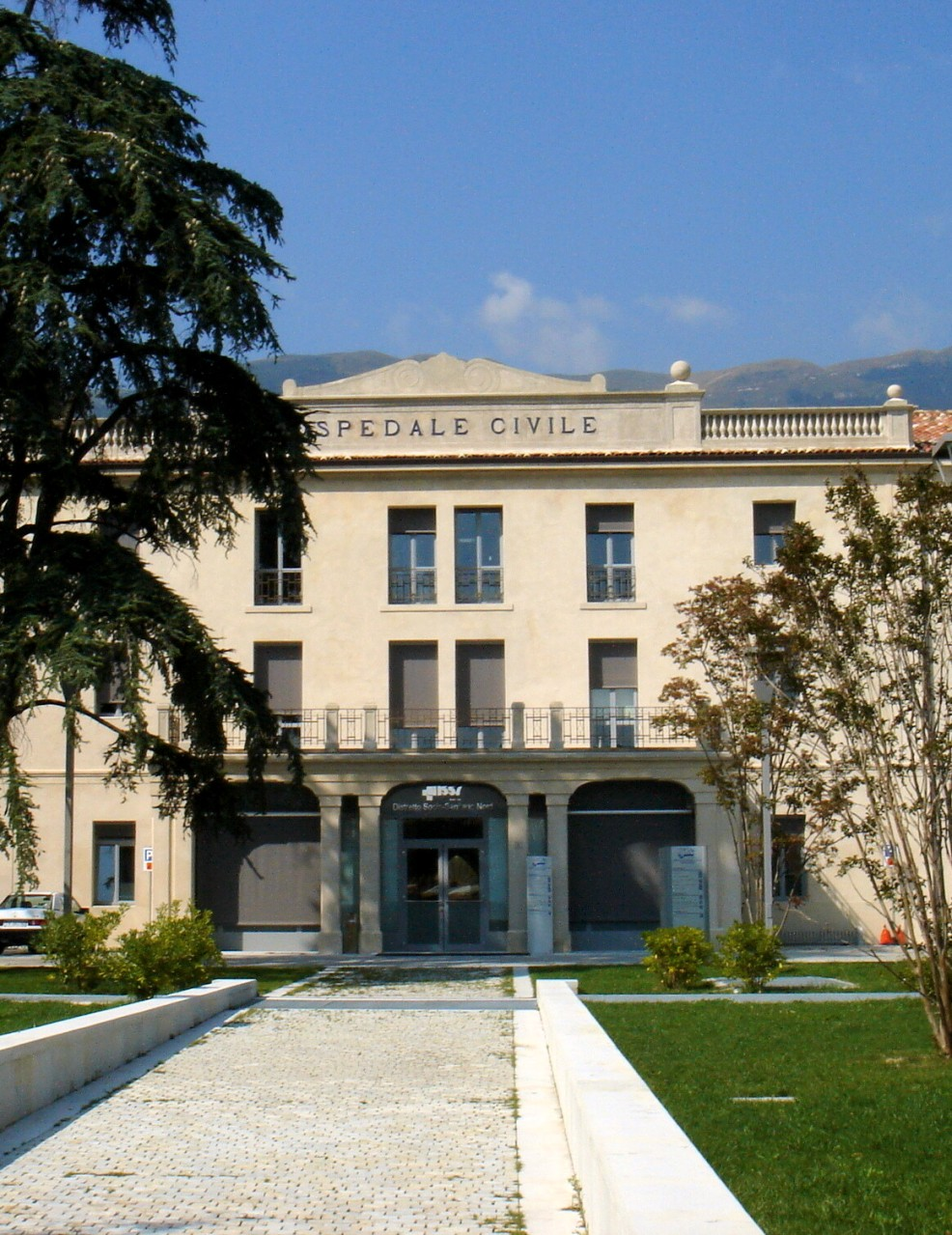 Serravalle di Vittorio Veneto (Treviso): ex ospedale civile, già scuola dei Battuti.